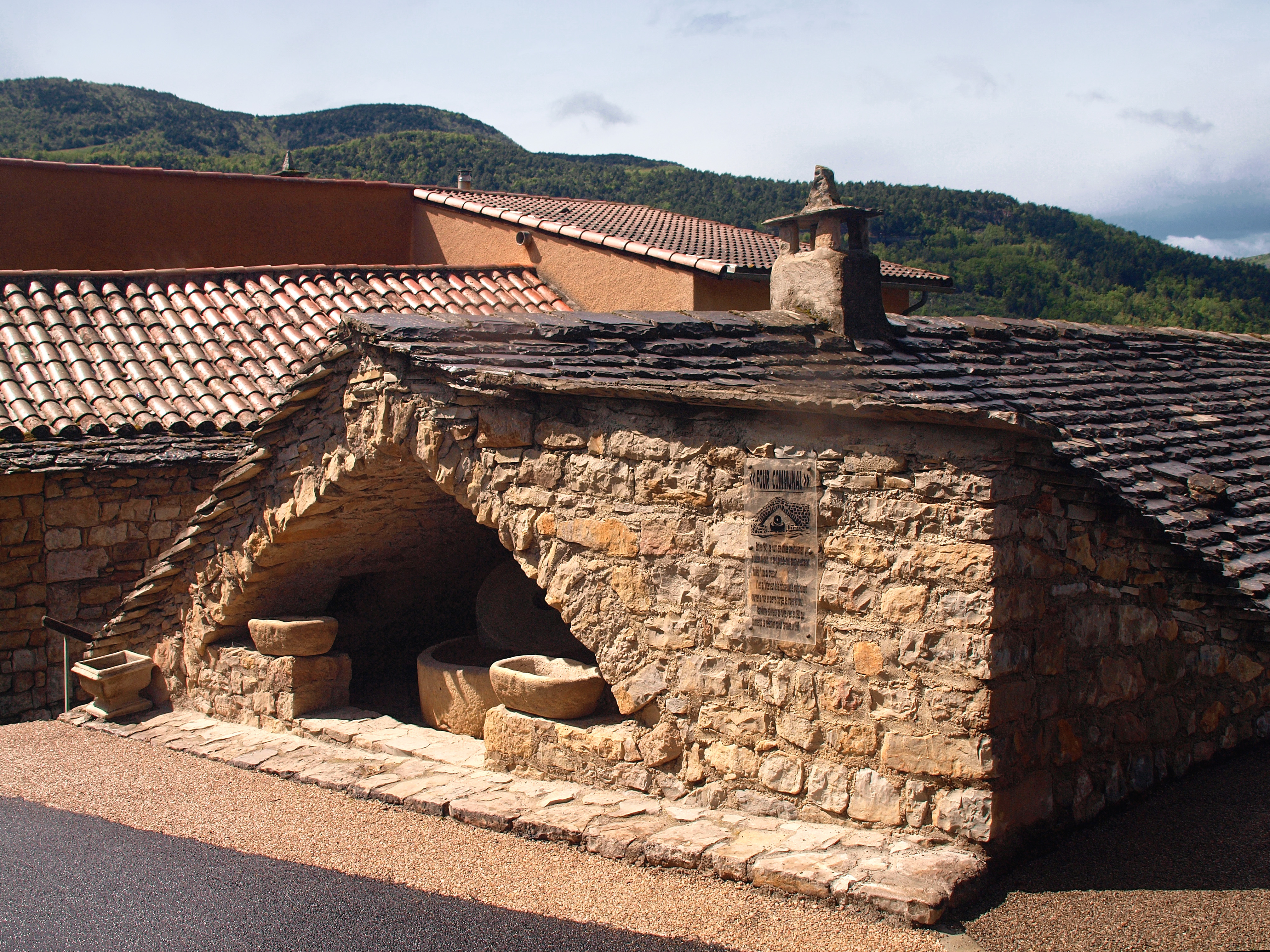 La Cresse (Aveyron) - Le four communal